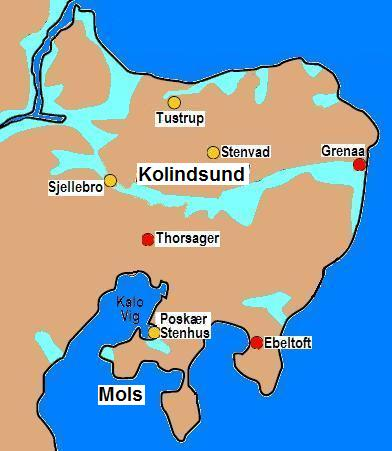 Poskaer